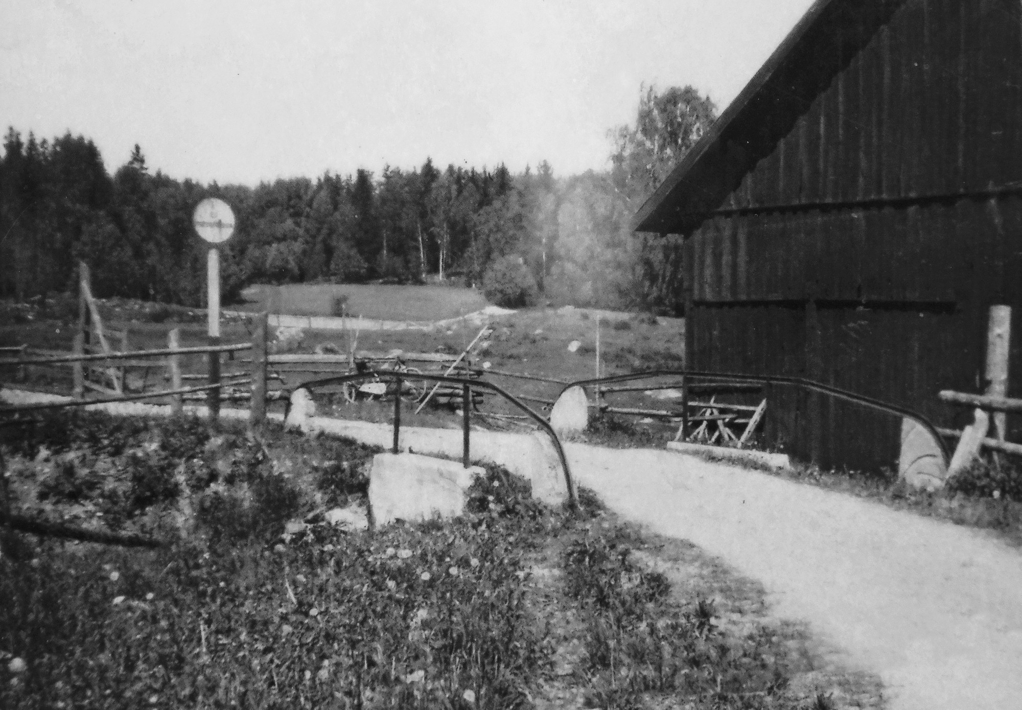 Hallinge kvarn, revs på 1950-talet